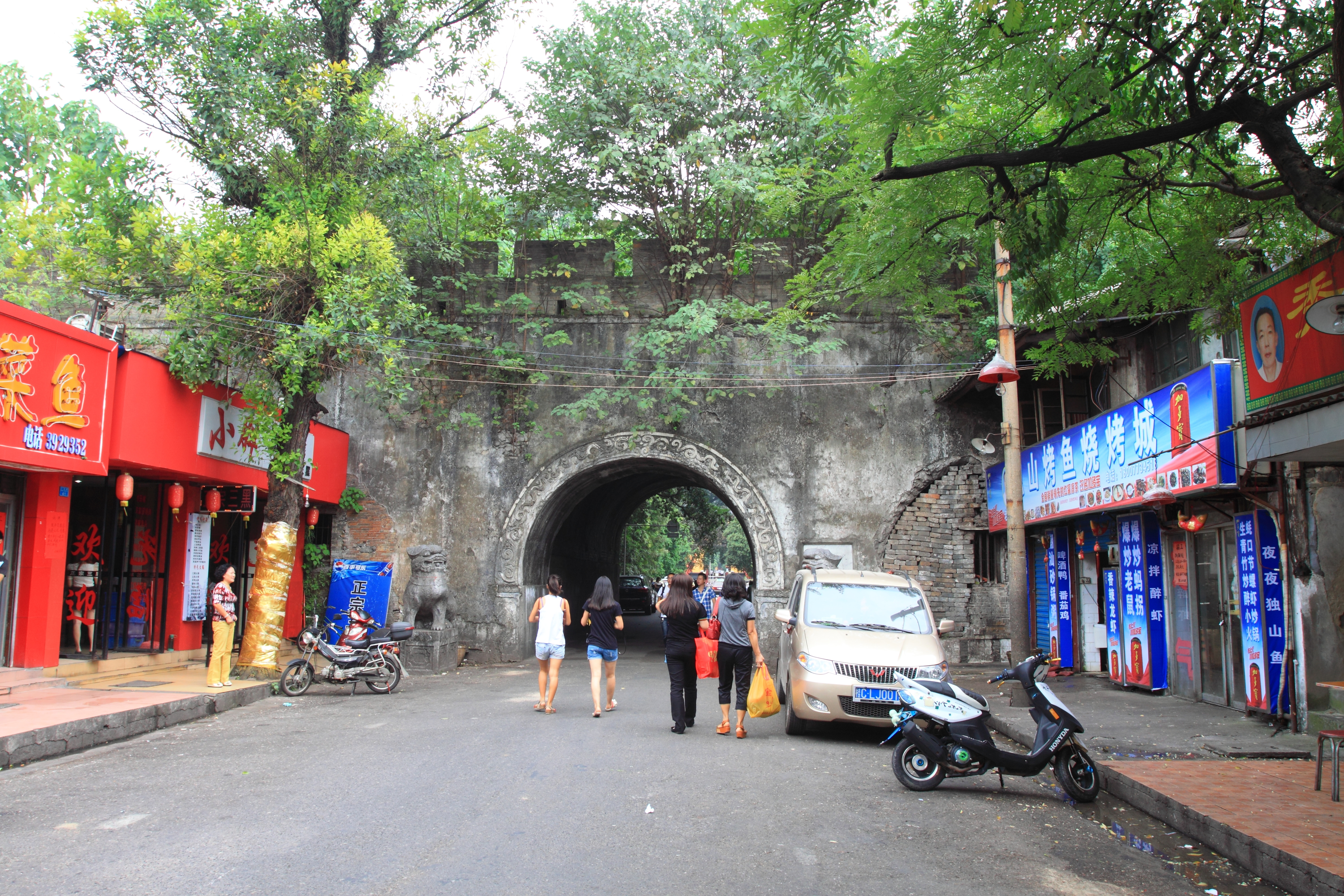 靖江王府南门（端礼门）南侧